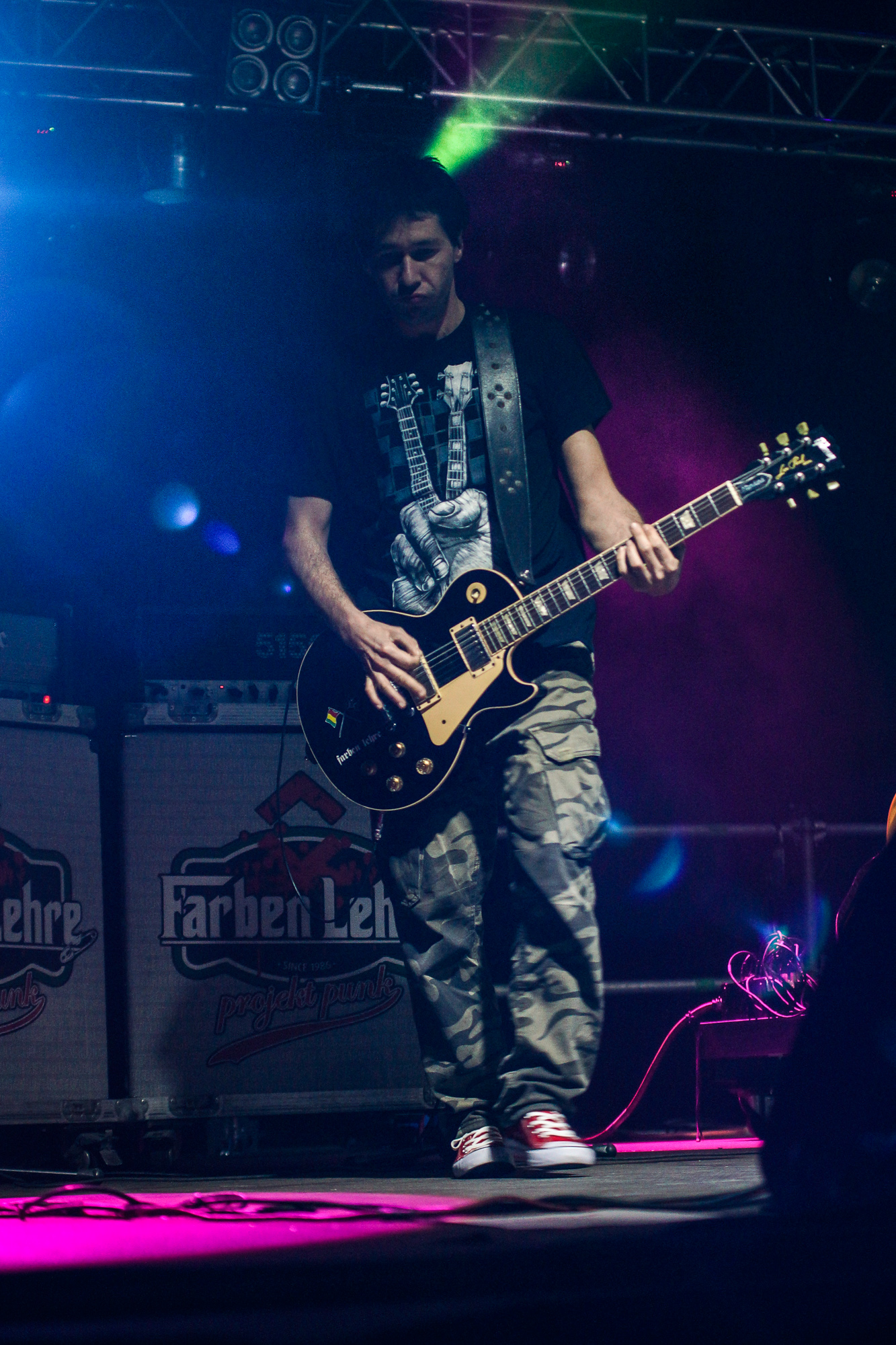 Zespół Farben Lehre podczas Rocket Festiwal 2014 w Warszawie.